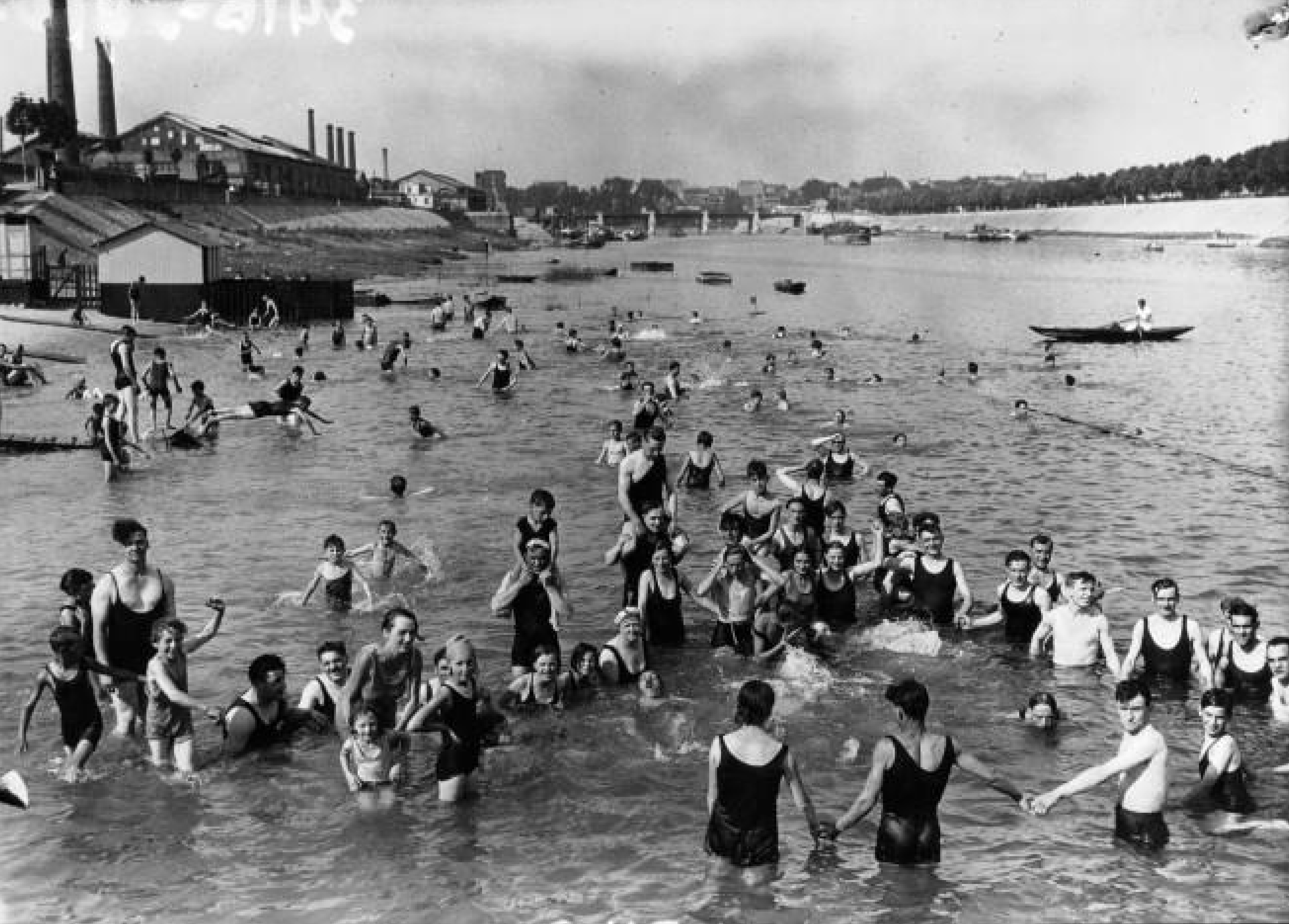 Bain du port à l'Anglais à Vitry-sur-Seine (Seine, France).